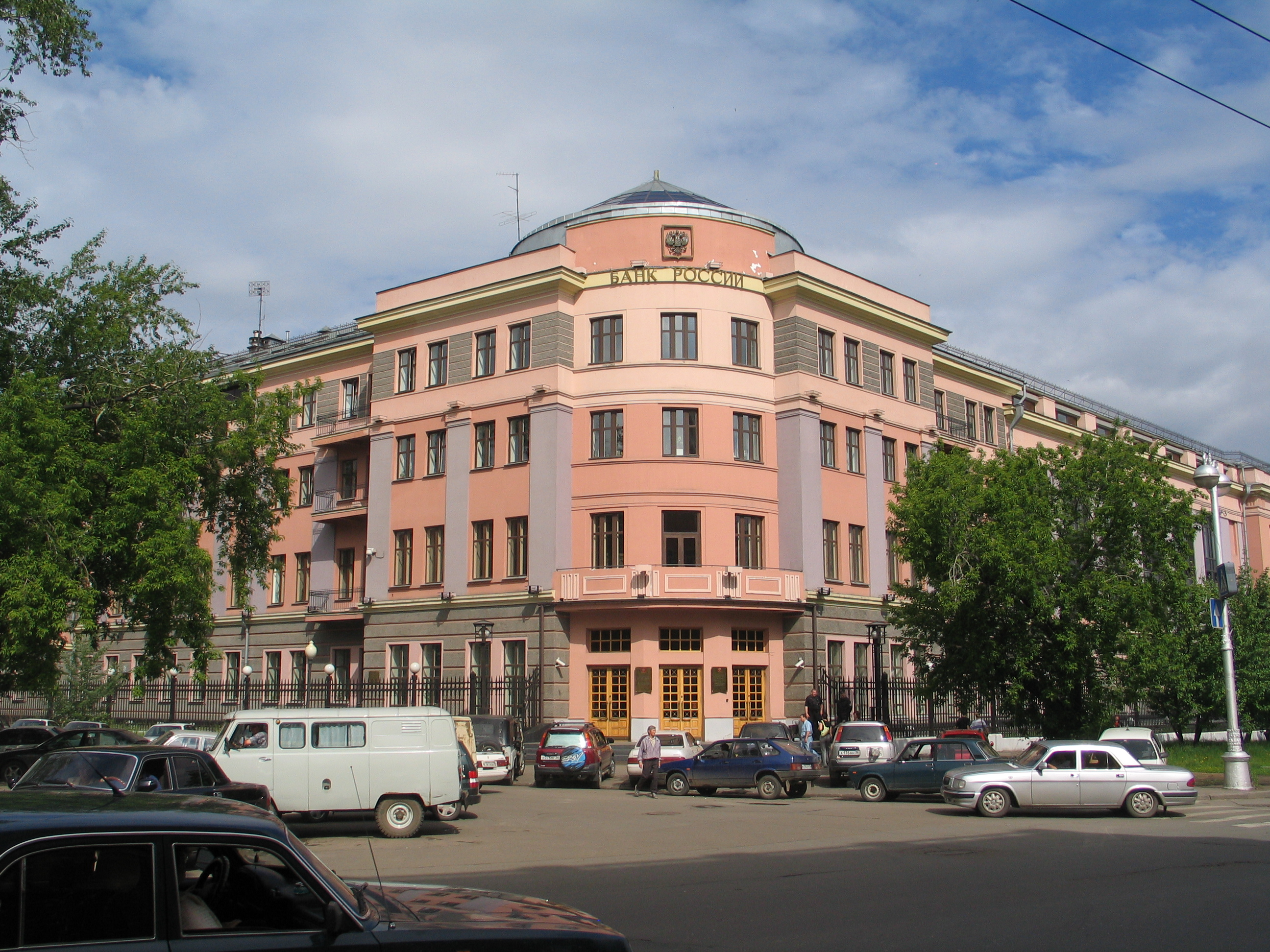 Здание иркутского отделения государственного банка ссср